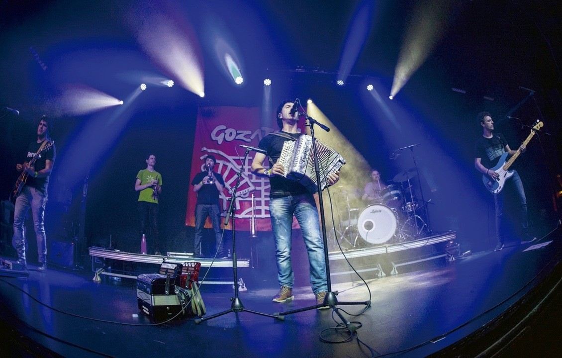 Gozategi Larrabetzu2018-Aikor